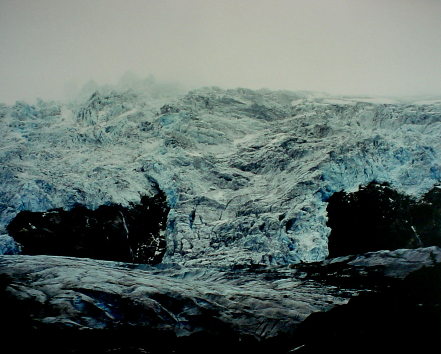 Buarbreen, Folgefonna, Norway